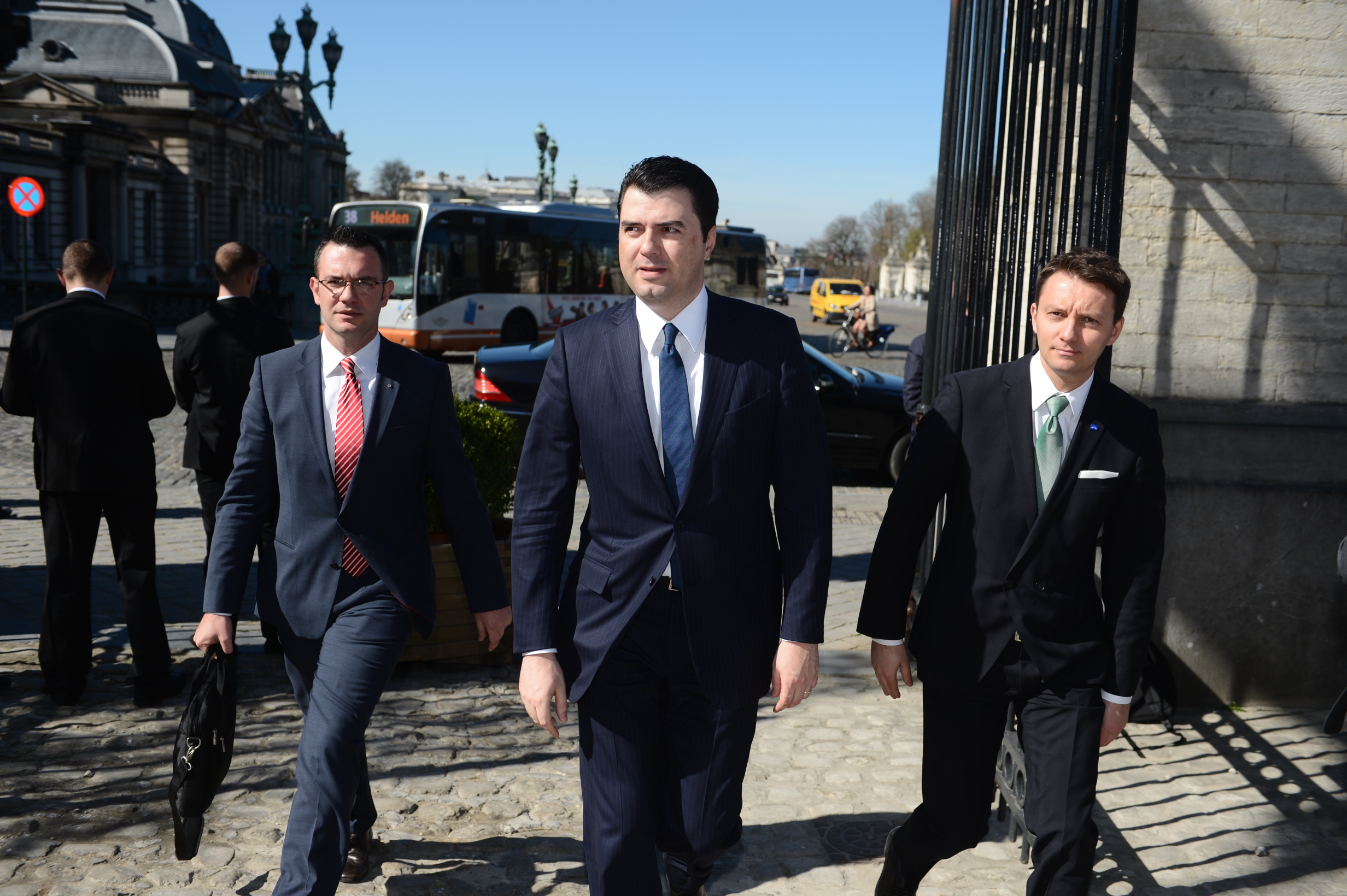 EPP Brussels Summit March 2014